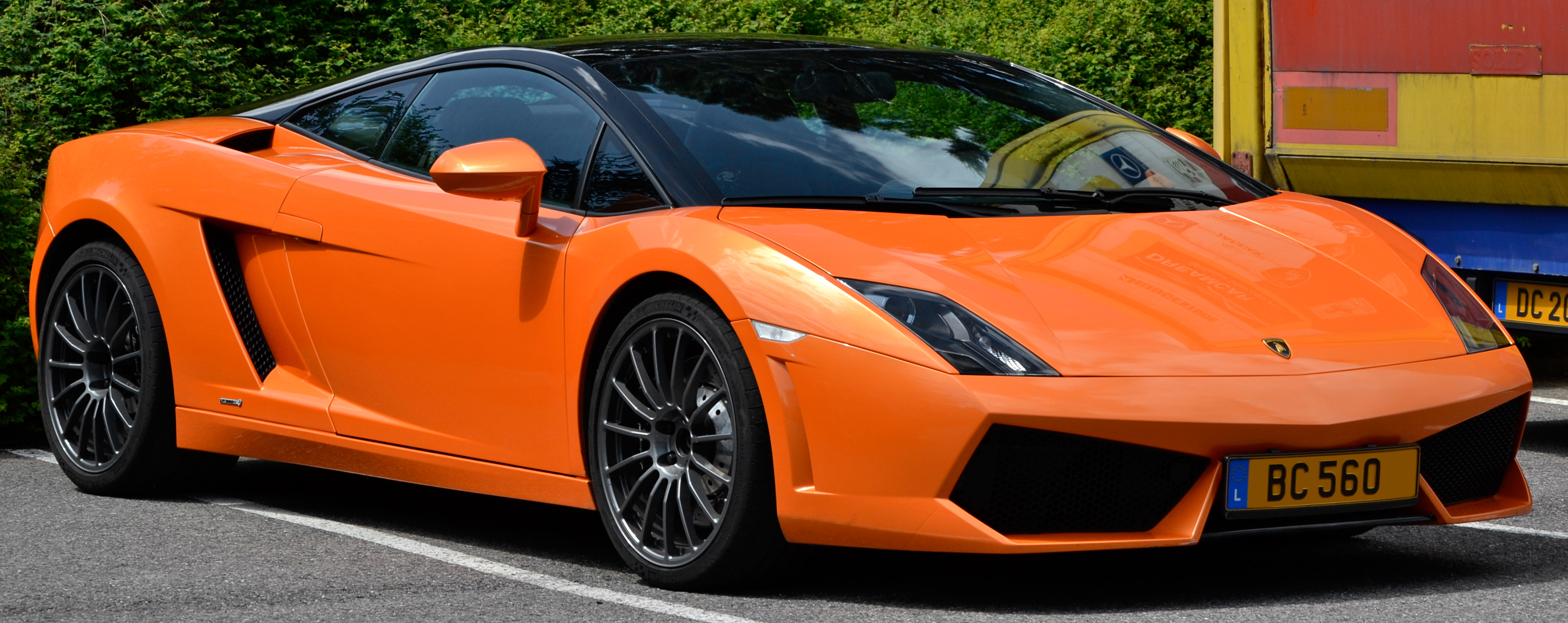 Lamborghini Gallardo LP 560-4 Bicolore